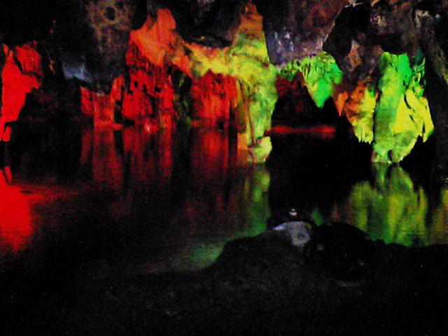 岡山県新見市にある鍾乳洞「満奇洞」の地底湖